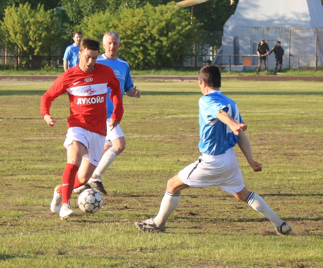 Товарищеский матч проходил на стадионе «Север» (ФОК «Севмаш» , Северодвинск)